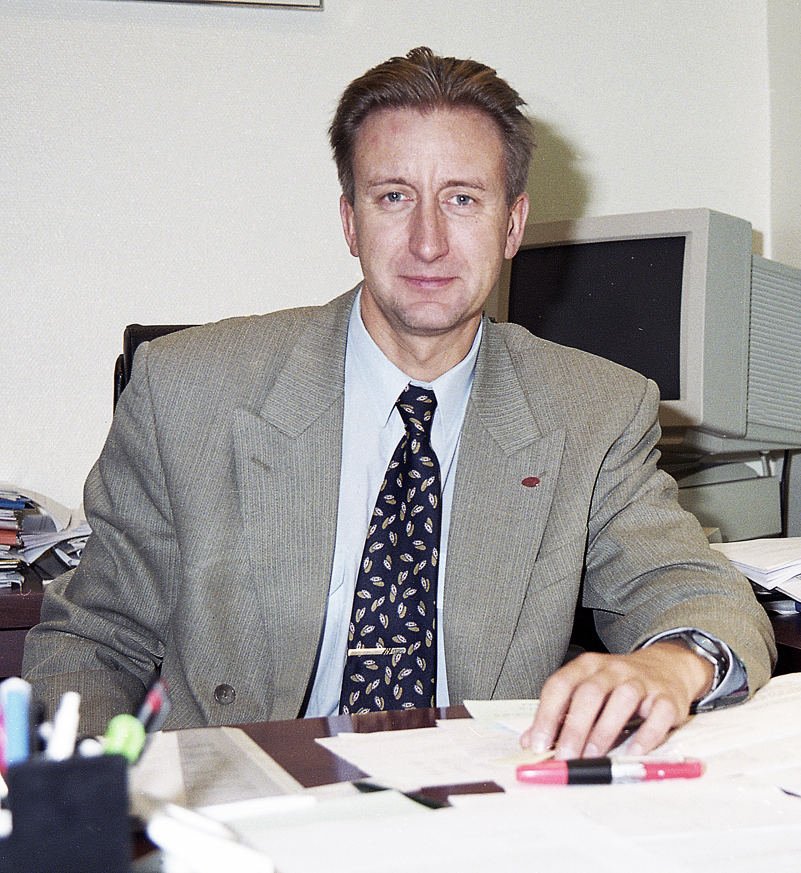 Olavi Tammemäe